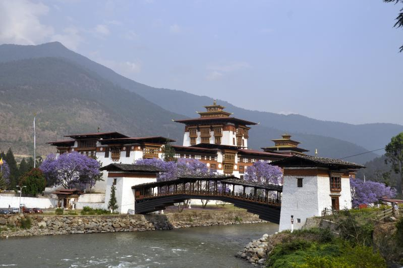 Phunaka, Bhutan 2012